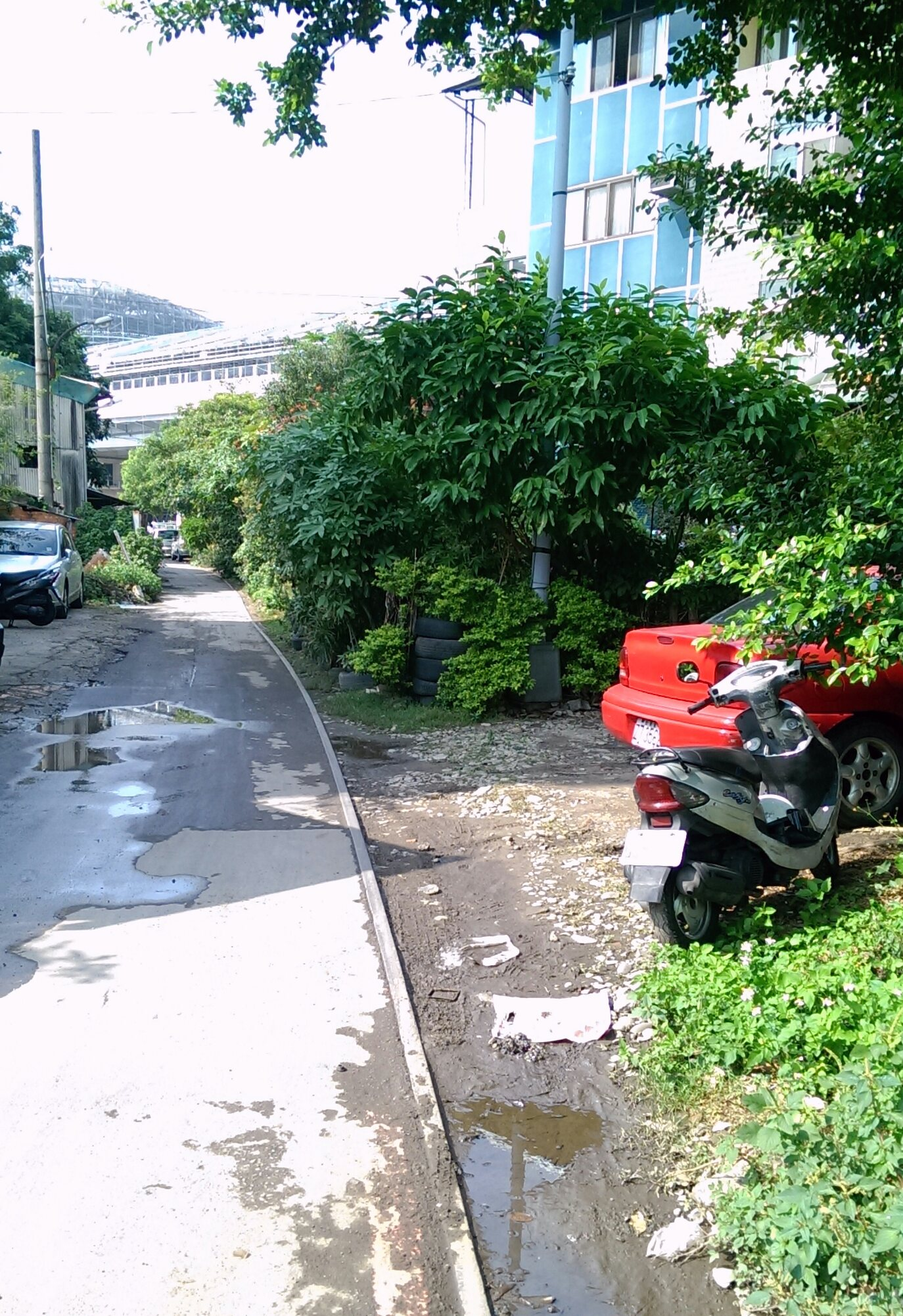 糖鐵中南線台中車站旁遺跡